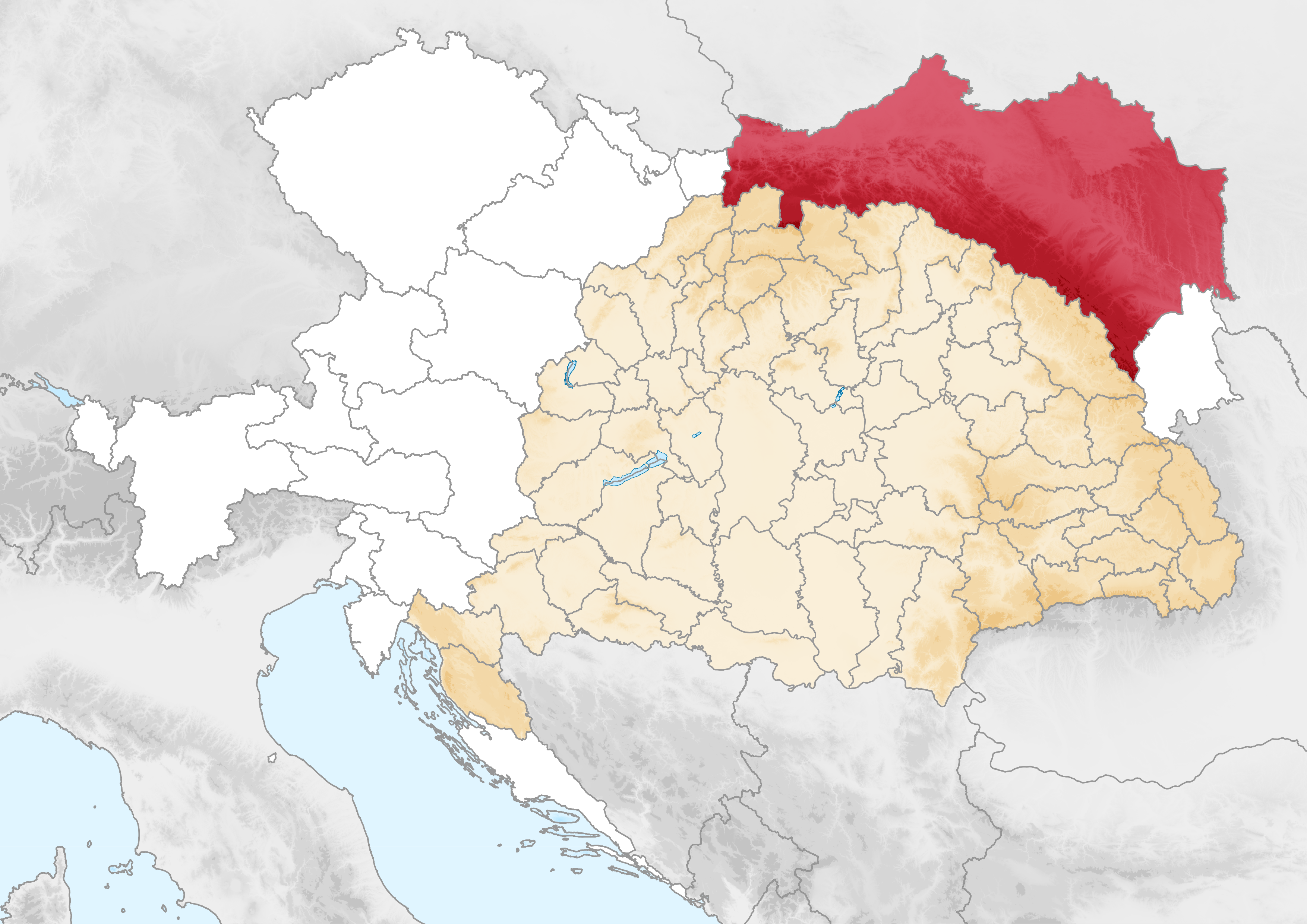 Carte de la Galicie en 1914